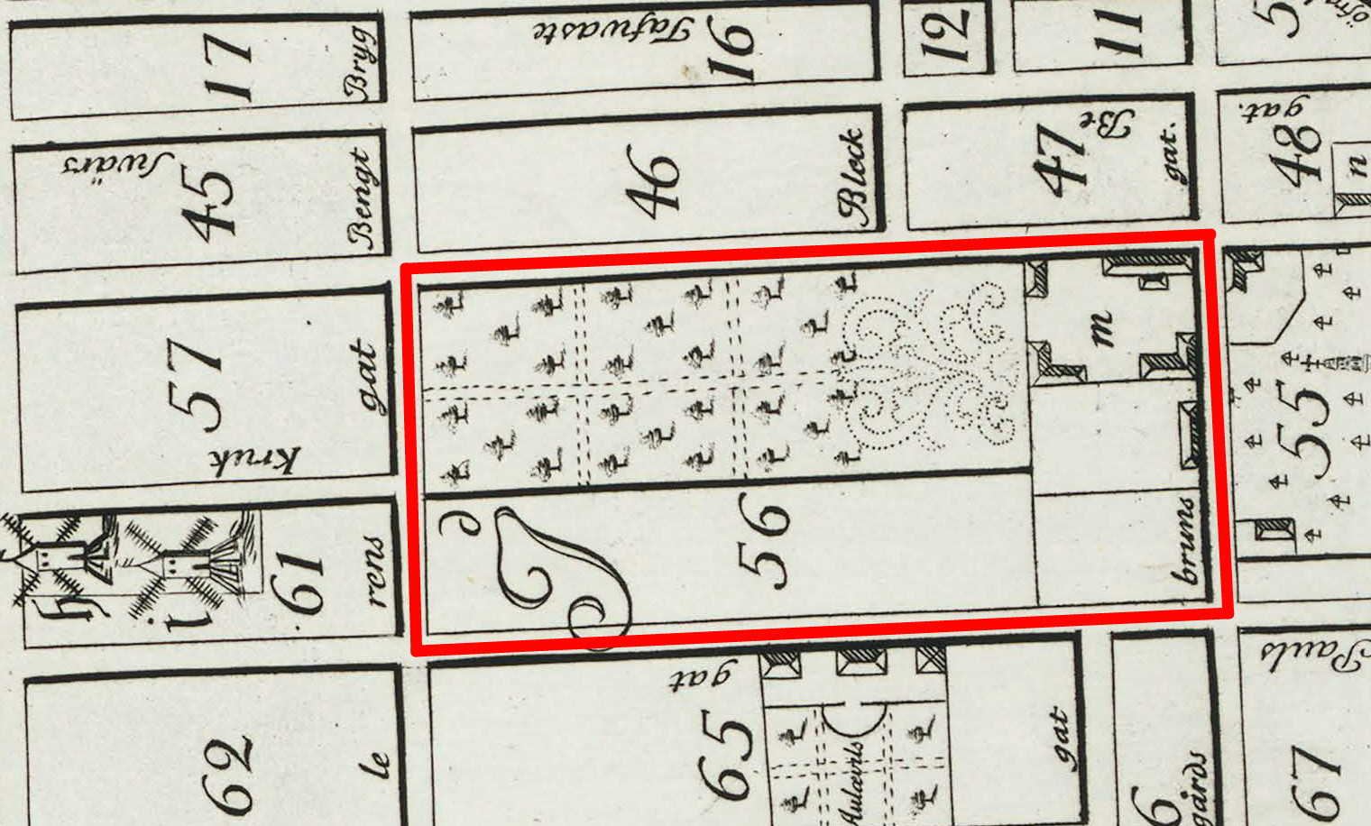 Del av Petrus Tillaeus karta över Stockholm, kvarteret Rosendahl (nr 56) på Södermalm